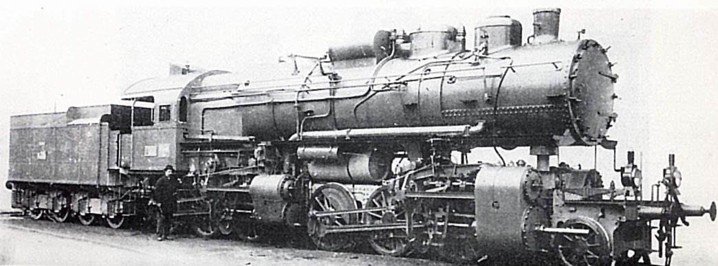 A MÁV 601. sorozatú Malett-rendszerű hegyi tehervonati gőzmozdonya.